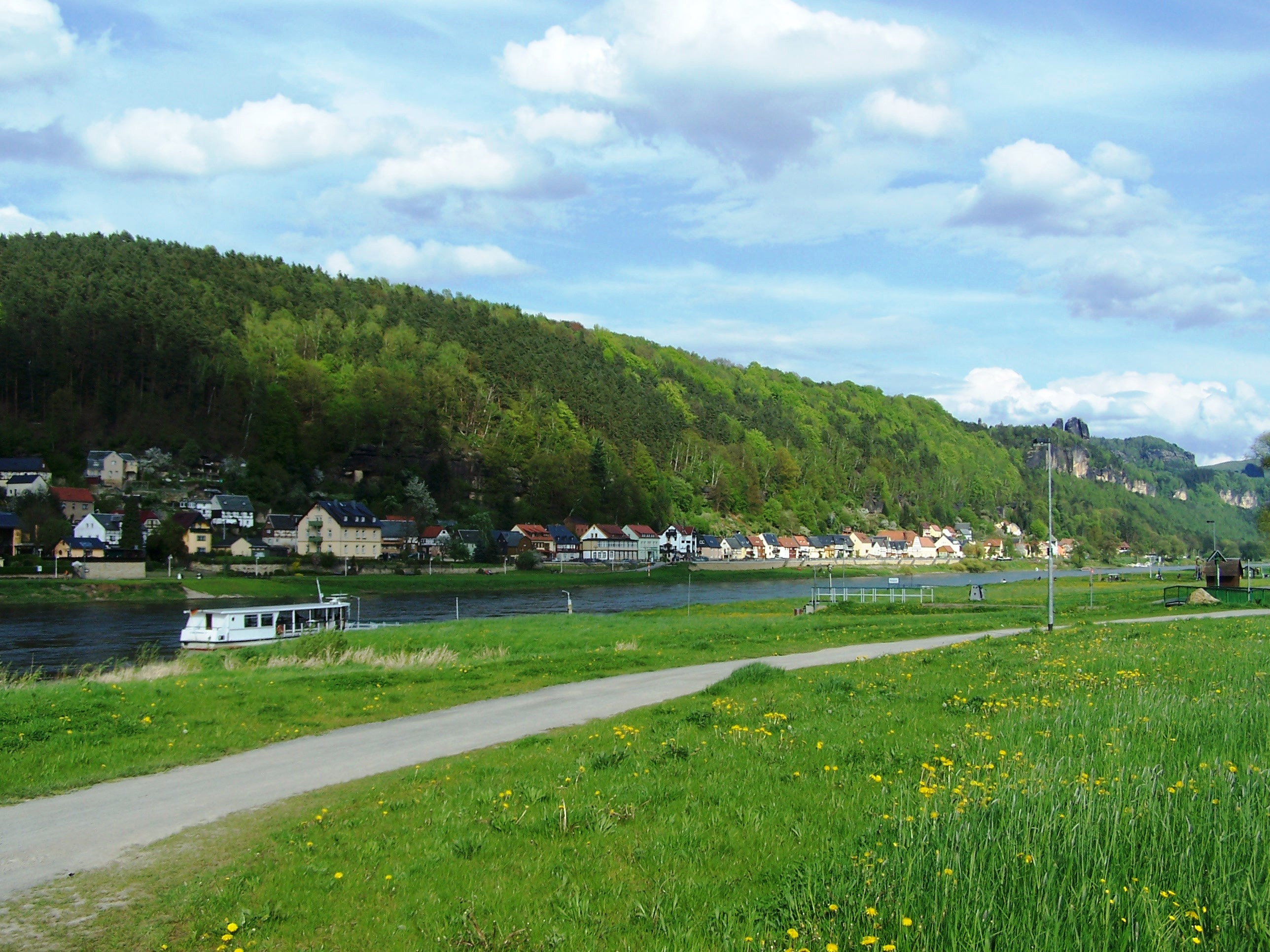 Postelwitz, Bad Schandau, Sächsische Schweiz